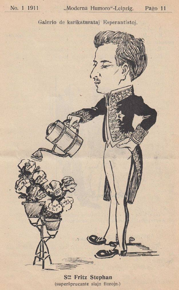 Karikaturo de la Esperantisto Fritz Stephan